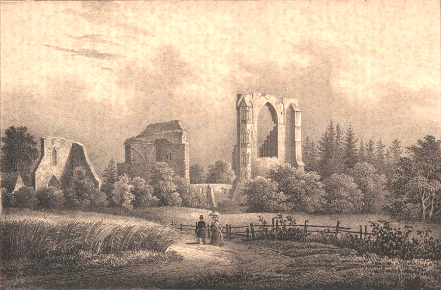 Ruinen des Klosters Eldena, Lithographie : 18 x 12 cm, Heinrich Wilhelm Teichgräber